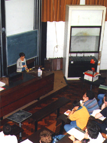 Mara impartiendo una clase